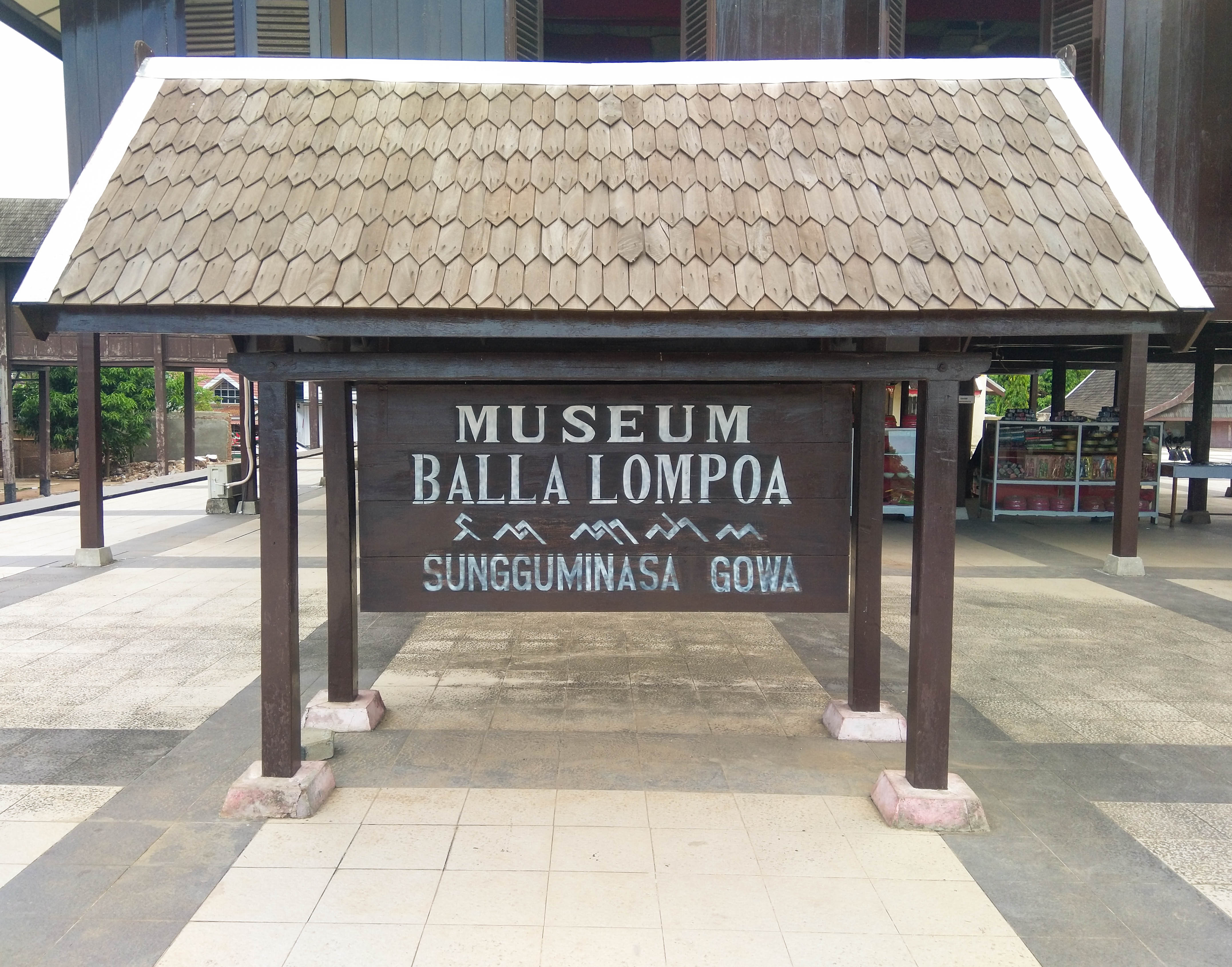 Papan tanda museum Balla Lompoa dalam aksara Latin dan Lontara